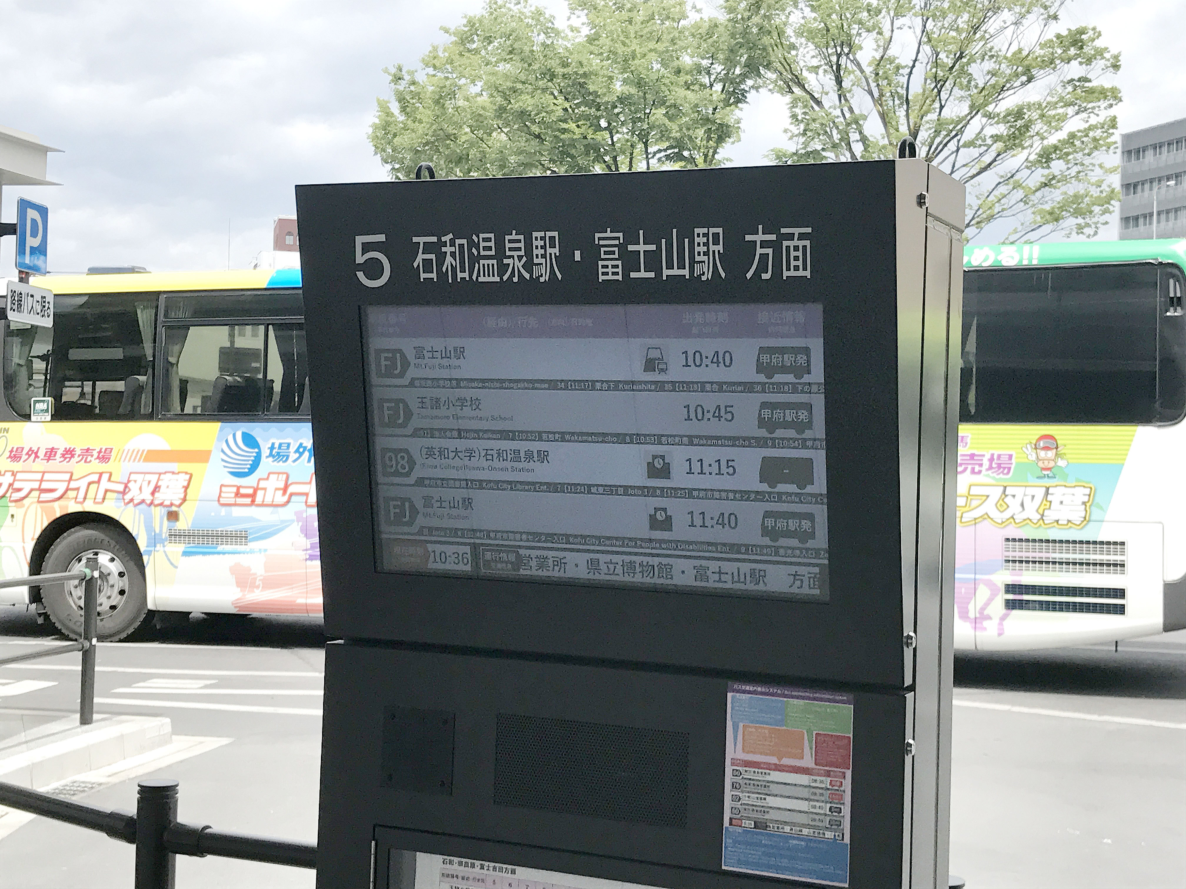 甲府駅南口バスロケーションシステム